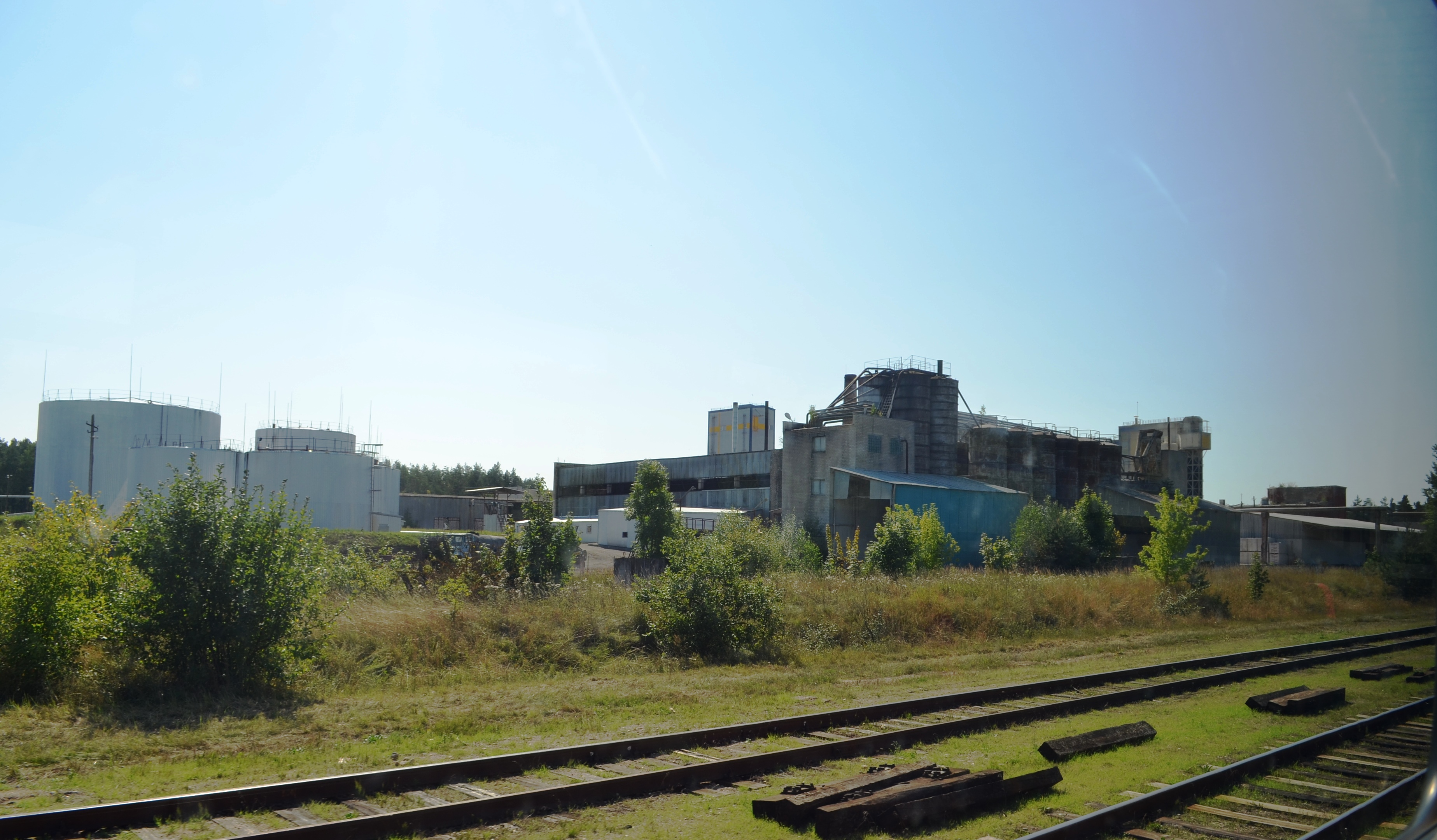 Matuizos, Varėnos raj. Vaizdas iš traukinio